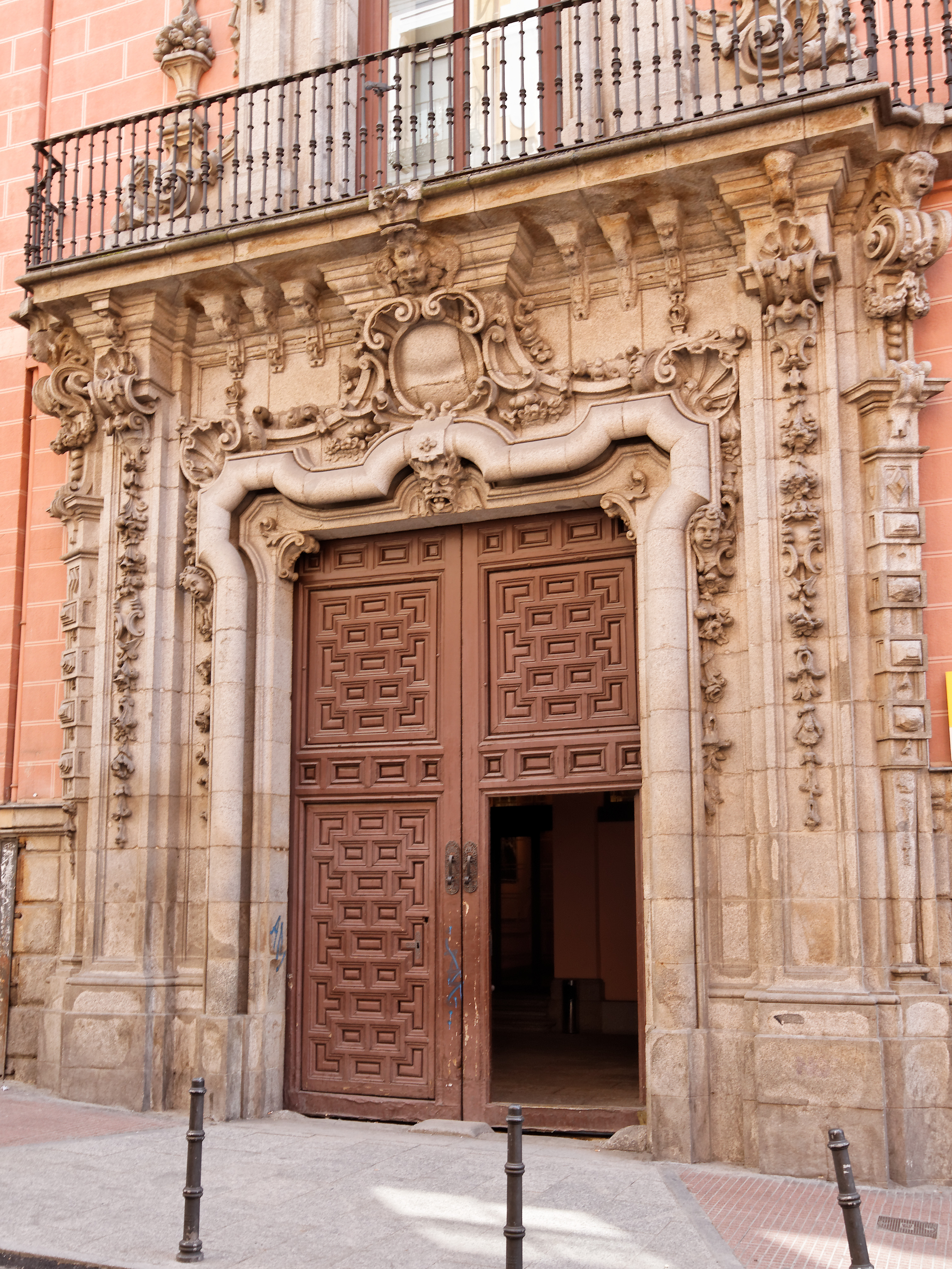 Puerta principal del Palacio del Marqués de Perales. Ubicado en la calle Magdalena Nº 10, Madrid. Este edificio construido entre 1731 y 1732 por Pedro de Ribera es actualmete sede de la Filmoteca Española.